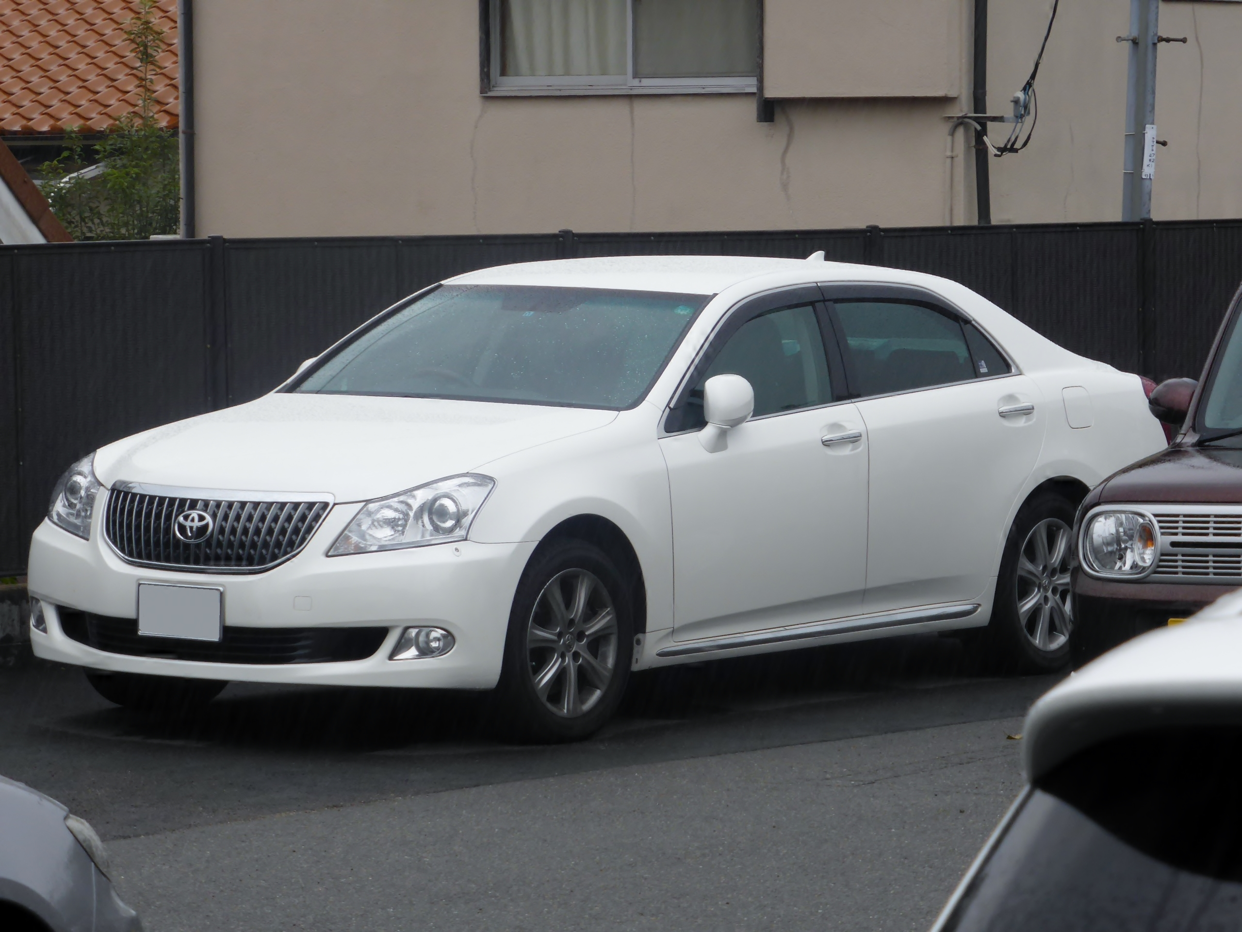 S200型トヨタ・クラウンマジェスタをフロントから撮影。